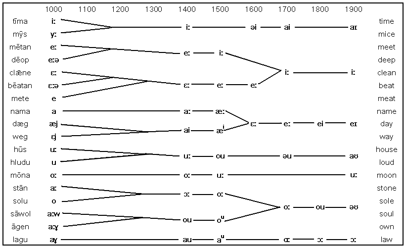 Vývoj anglických hlásek